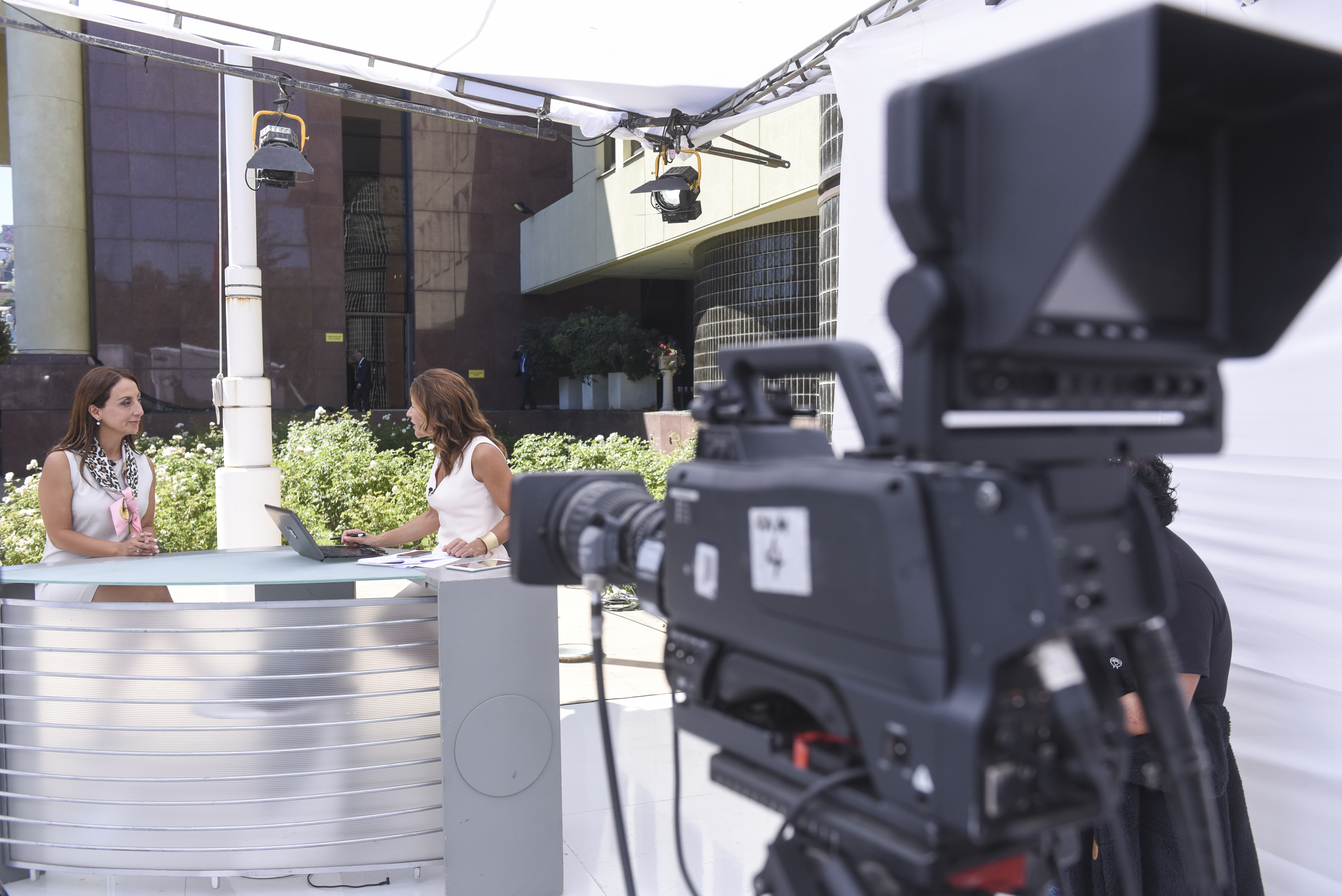 Cambio de Mando 2018